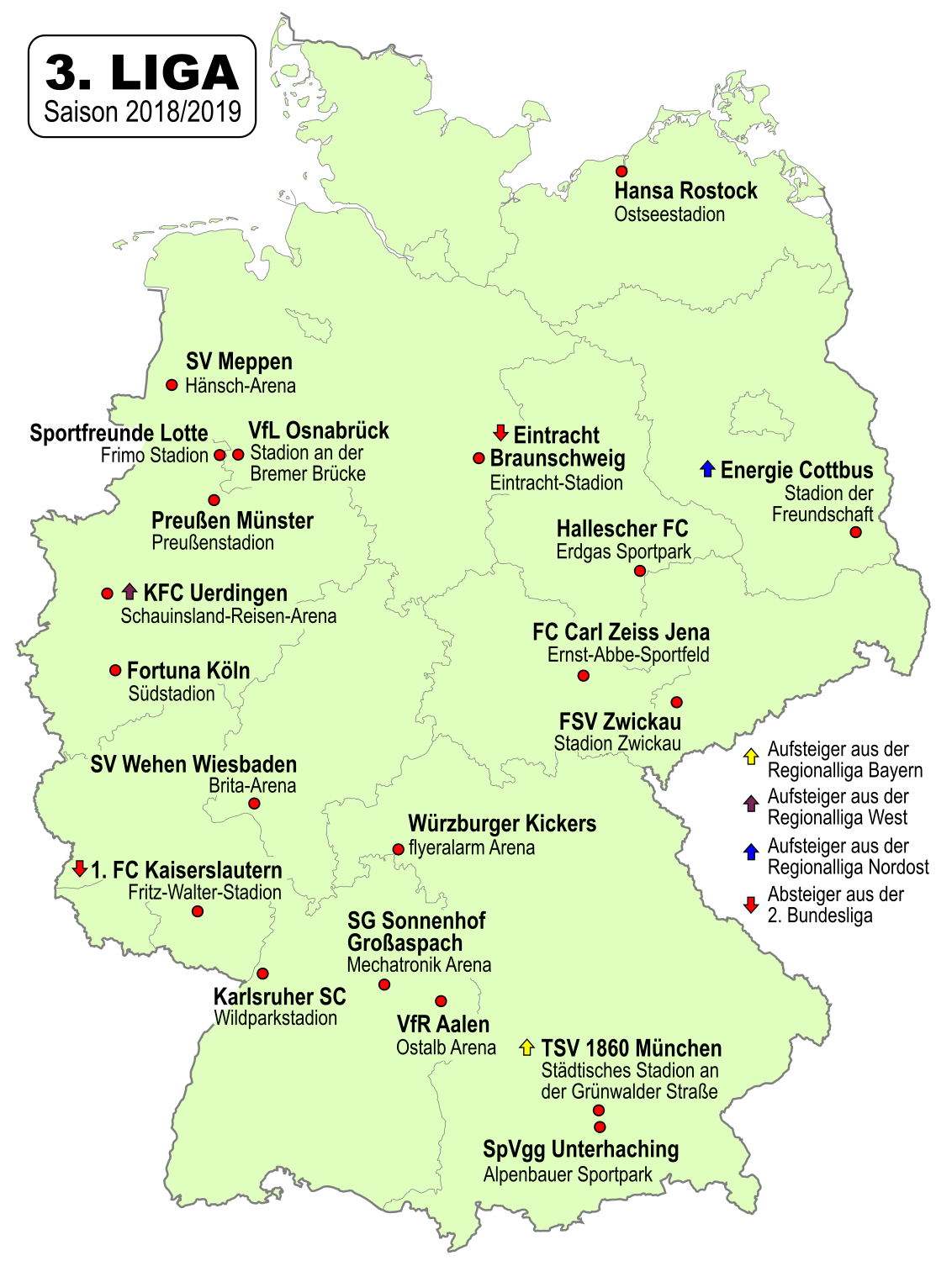 Karte der Vereine der 3. Fussball-Liga 2018/2019